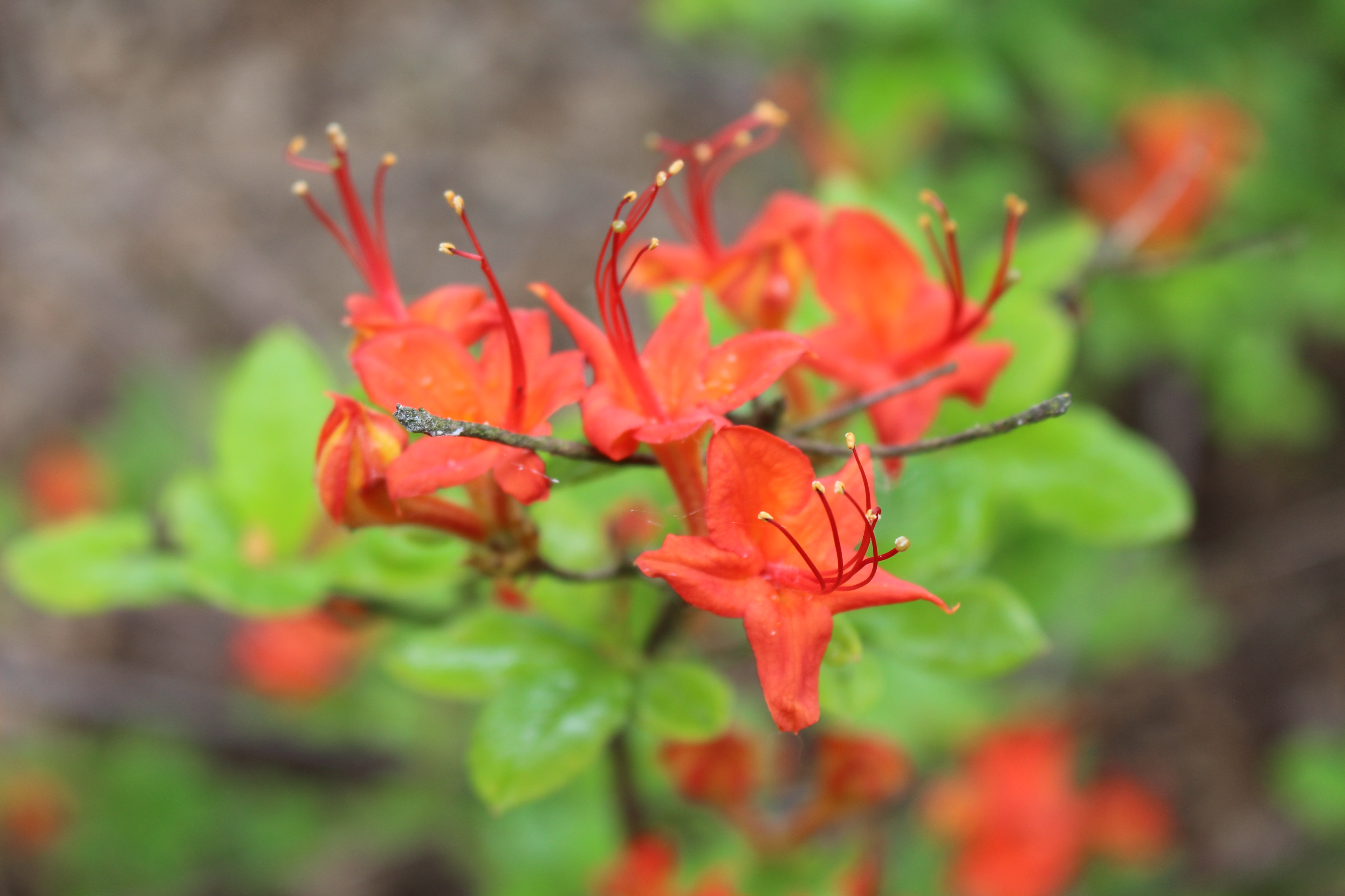 flowers of Rhododendron bakeri in the 'Botanika' in Bremen, Germany.